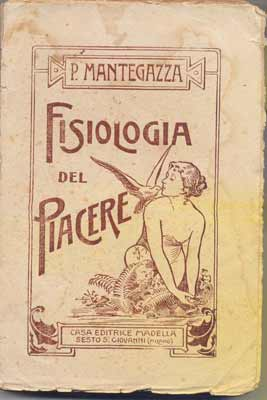 saggio